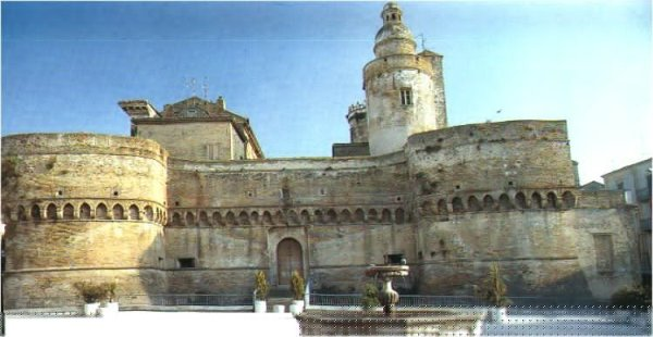 Castello Caldoresco